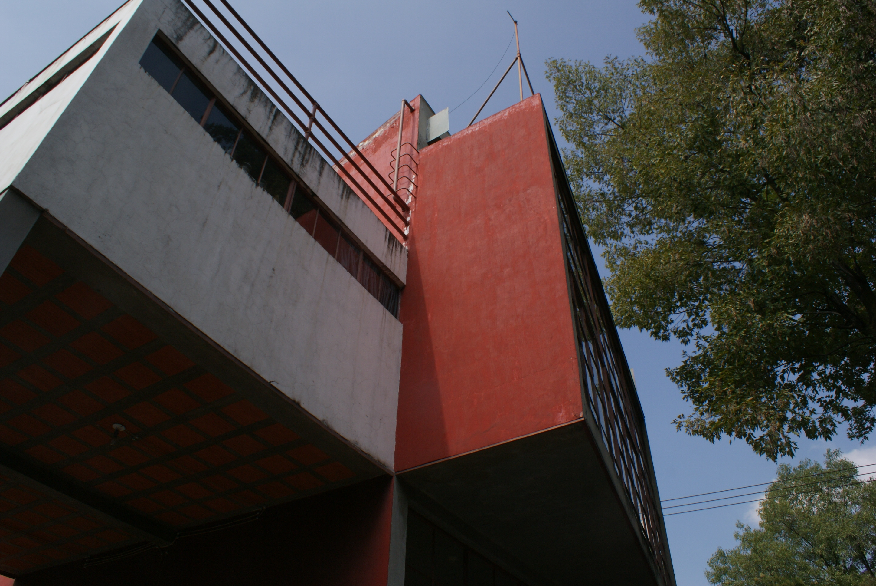 Parte de atrás de la casa de Diego vista desde abajo. Se ven el exterior de las ventanas de su recamara, y de su estudio. La parte blanca es el exterior de la recámara, y la parte roja el exterior del estudio.